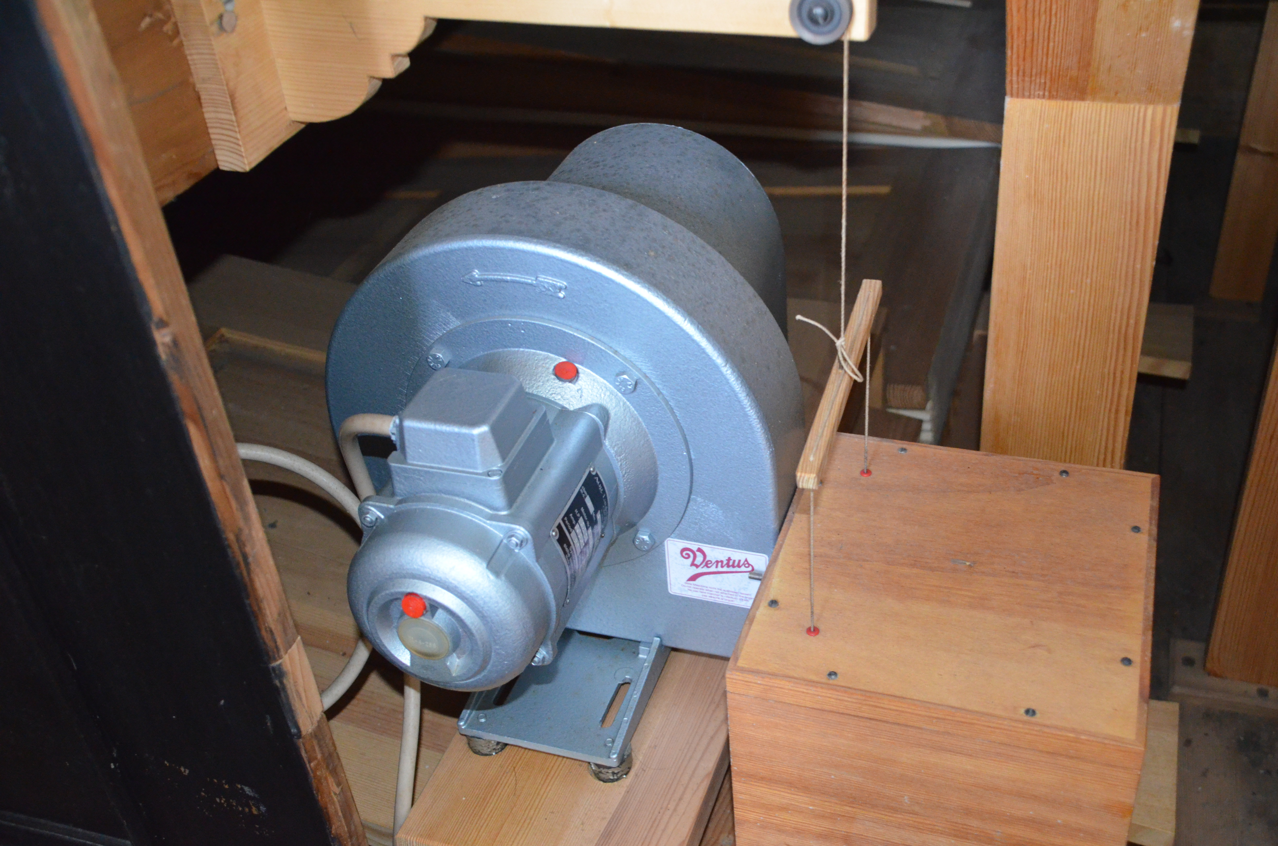 Orgelmotor